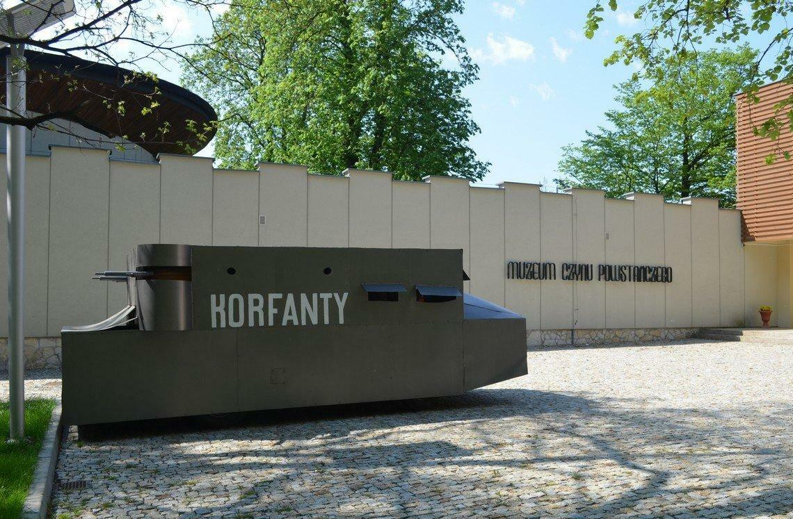 Makieta (model) wozu opancerzonego KORFANTY